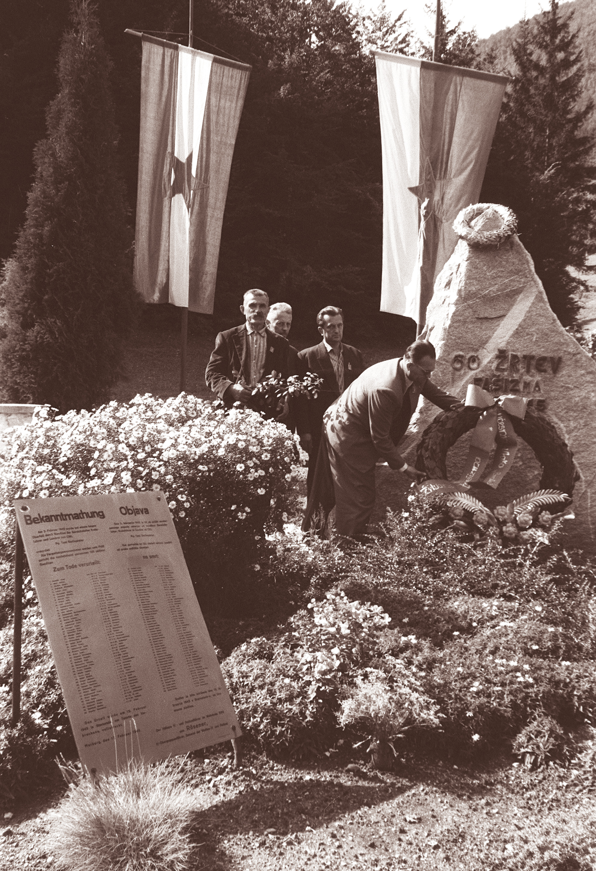 Vlak bratstva in enotnosti - gostje iz Srbije polagajo venec pri spomeniku v Frankolovem